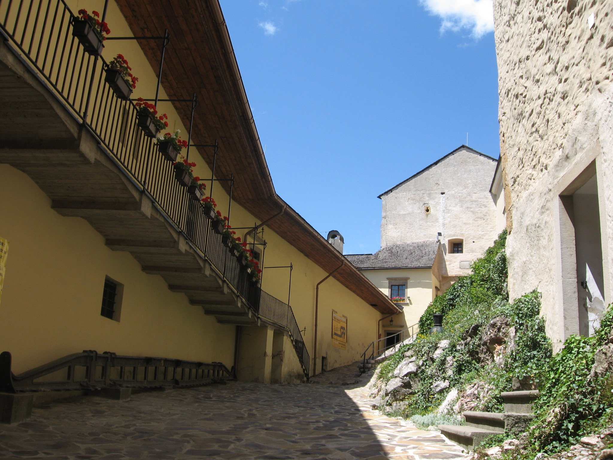 Krásna Hôrka, nádvorie